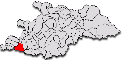 Categorie:Hărţi ale judeţului Maramureş